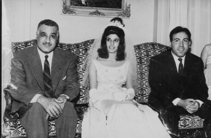 عقد قران فؤاد الركابي - القاهرة 1963 بحضور جمال عبد الناصر